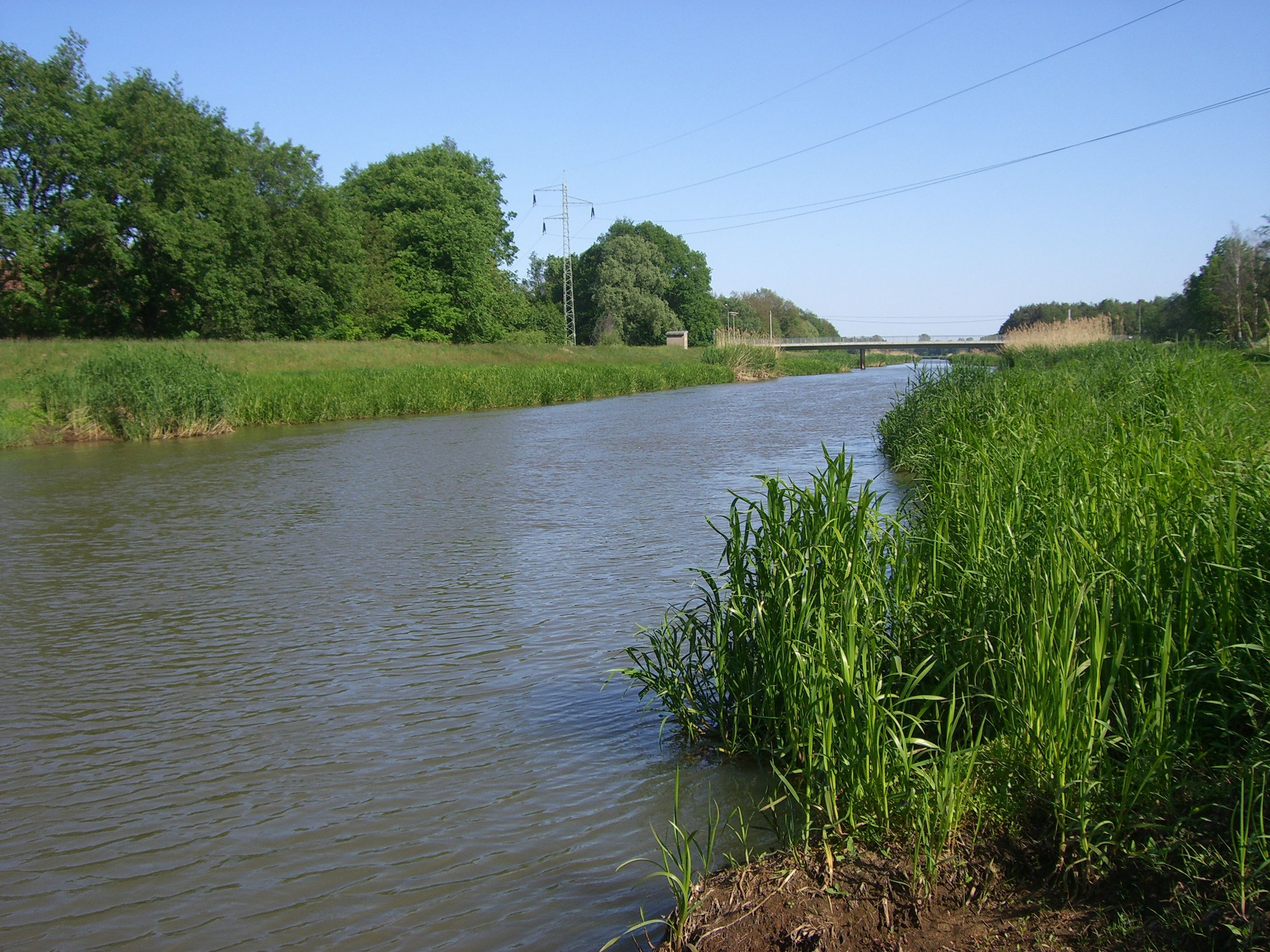 Schwarze Elster, Elsterbrücke Löben